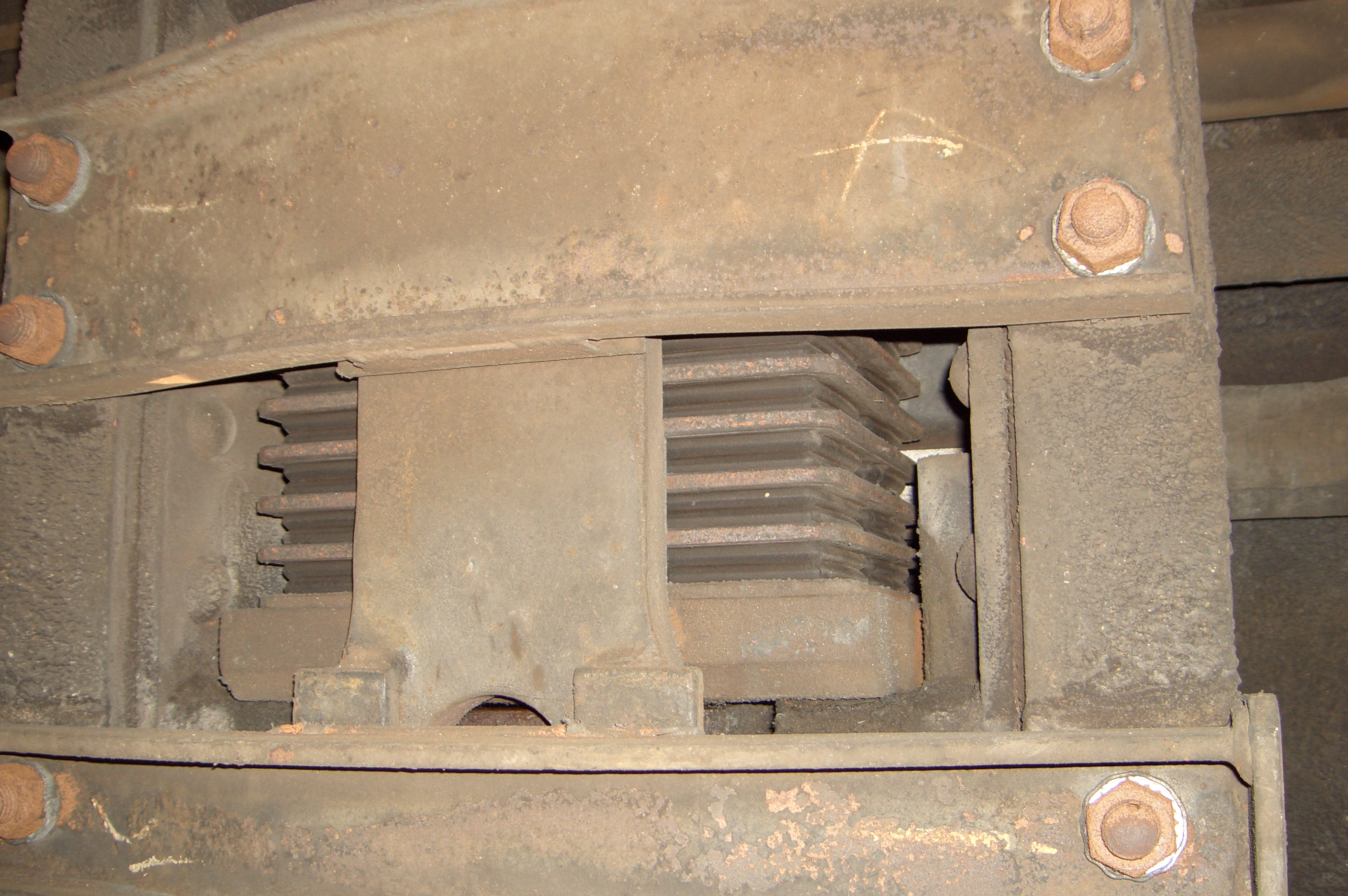 日本国有鉄道 オハフ50 68 連結器、梅小路蒸気機関車館にて撮影